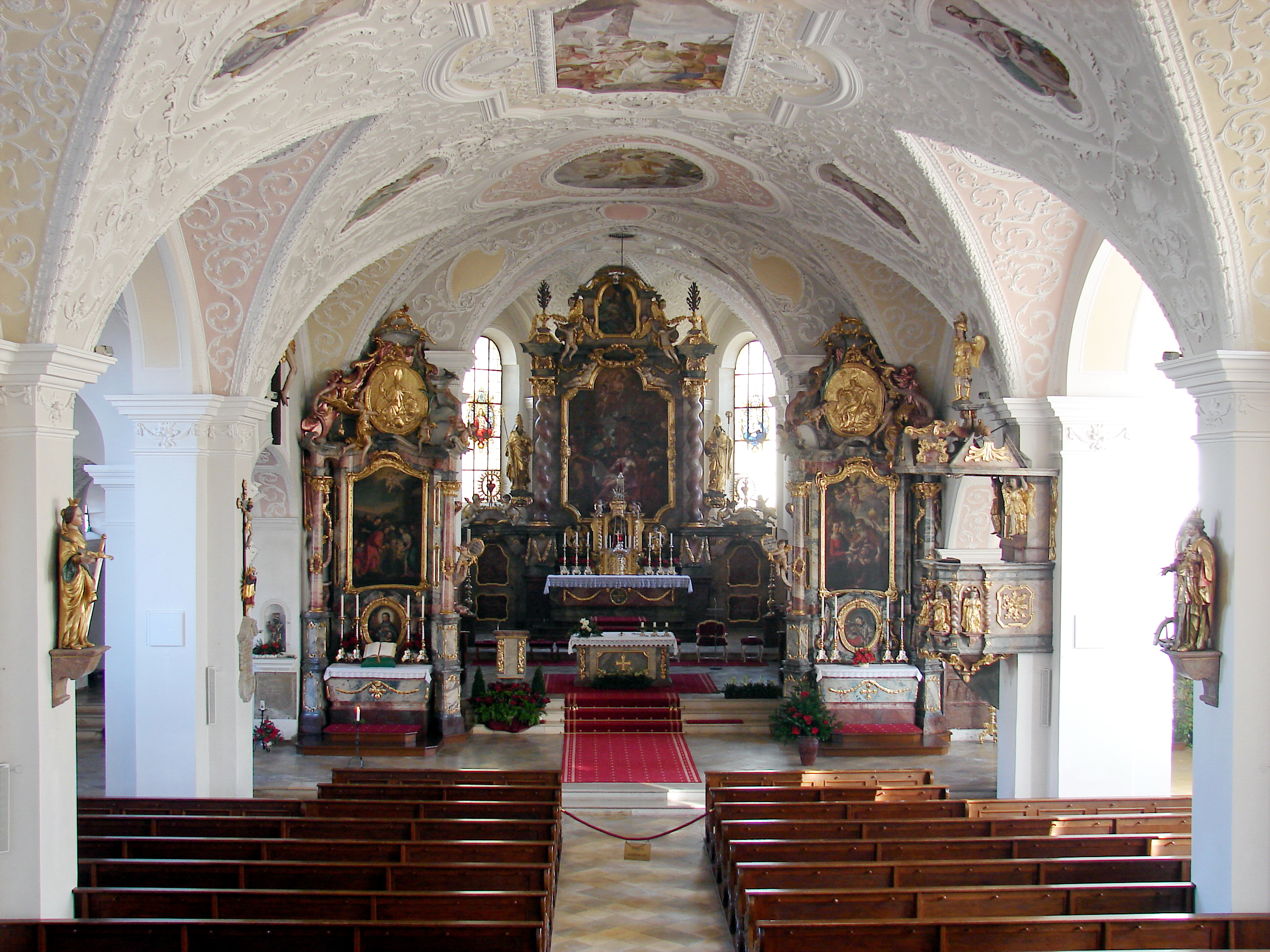 St. Laurentius ist eine katholische Pfarrkirche in Wolnzach, einem Markt im oberbayerischen Landkreis Pfaffenhofen an der Ilm.